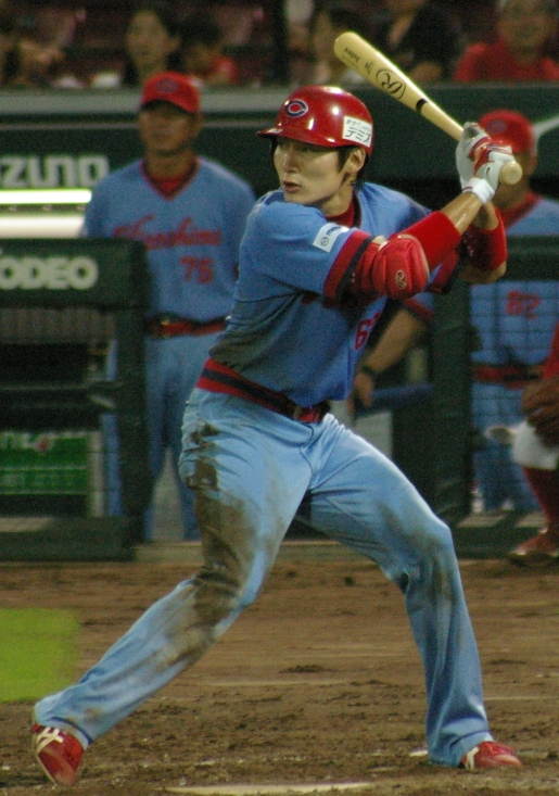 広島東洋カープ丸佳浩